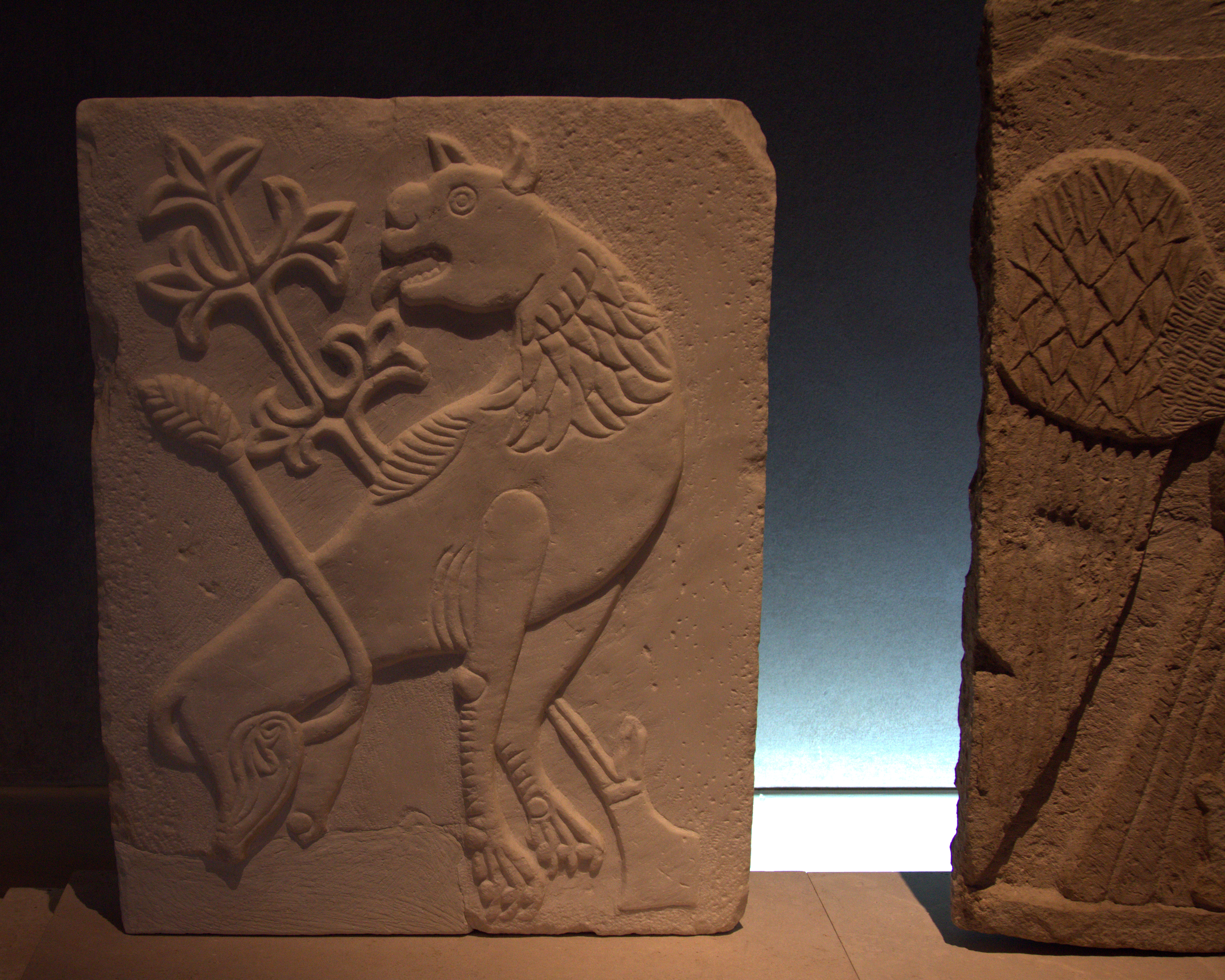 Μουσείο Βυζαντινού Πολιτισμού, Θεσσαλονίκη.